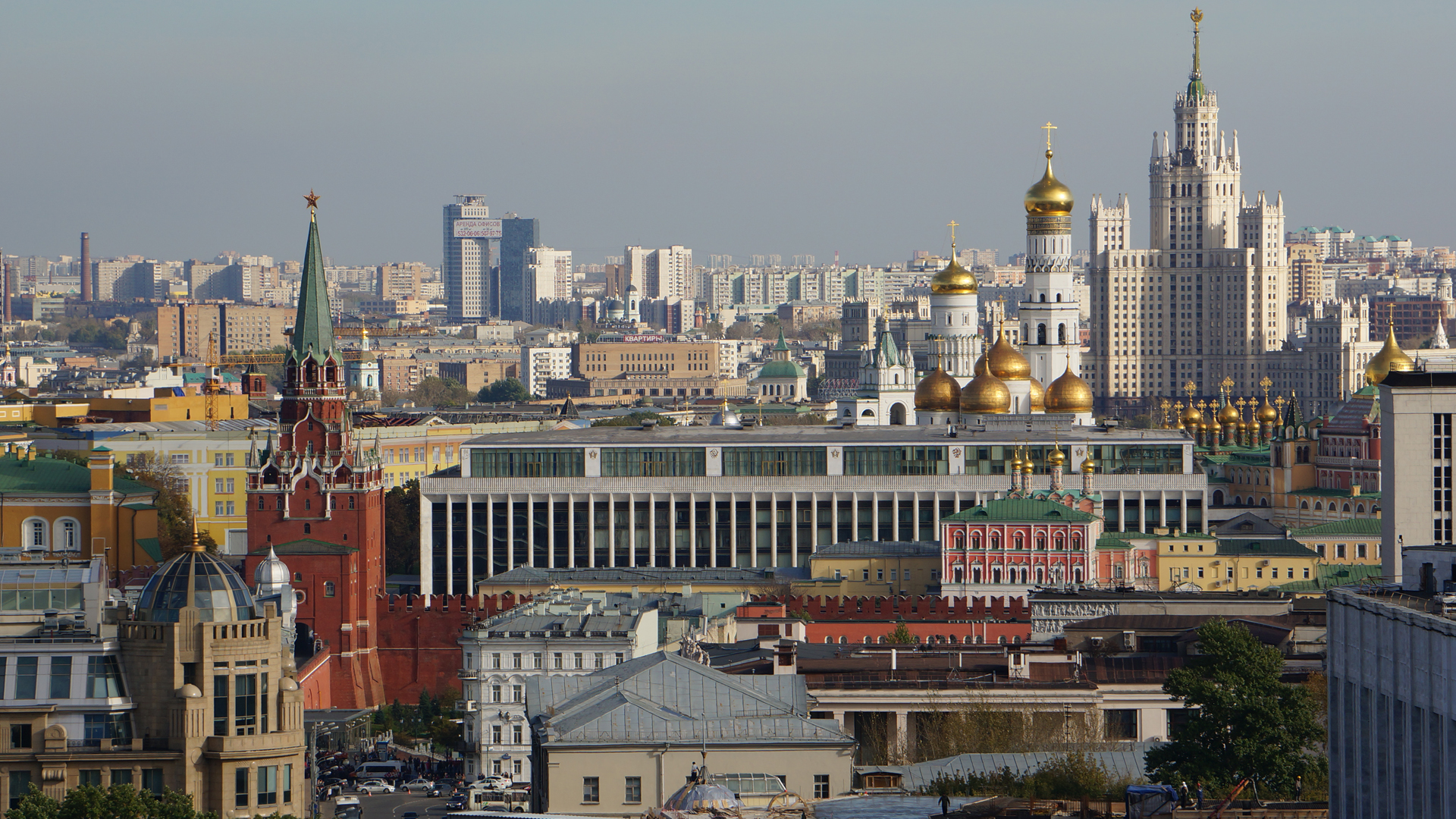 вид на Кремль со стороны Кутафьей башни